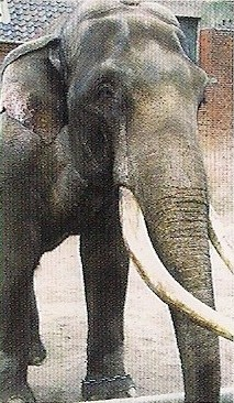 Billede af elefanten Chieng-Mai fra Københavns Zoo.